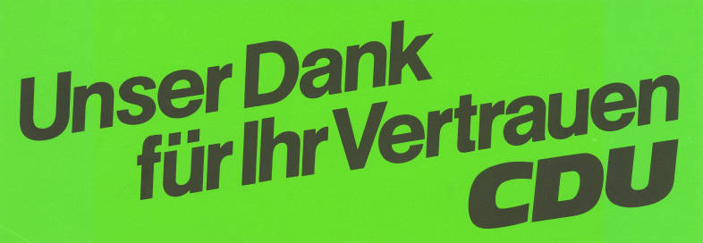 Unser Dank für Ihr Vertrauen CDU Kommentar: Plakataufkleber Plakatart: Textplakat Allgemein Objekt-Signatur: 10-008 : 512 Bestand: Landtagswahlplakate Niedersachsen (10-008) GliederungBestand10-18: Landtagswahlplakate Niedersachsen (10-008) » CDU Lizenz: KAS/ACDP 10-008 : 512 CC-BY-SA 3.0 DE